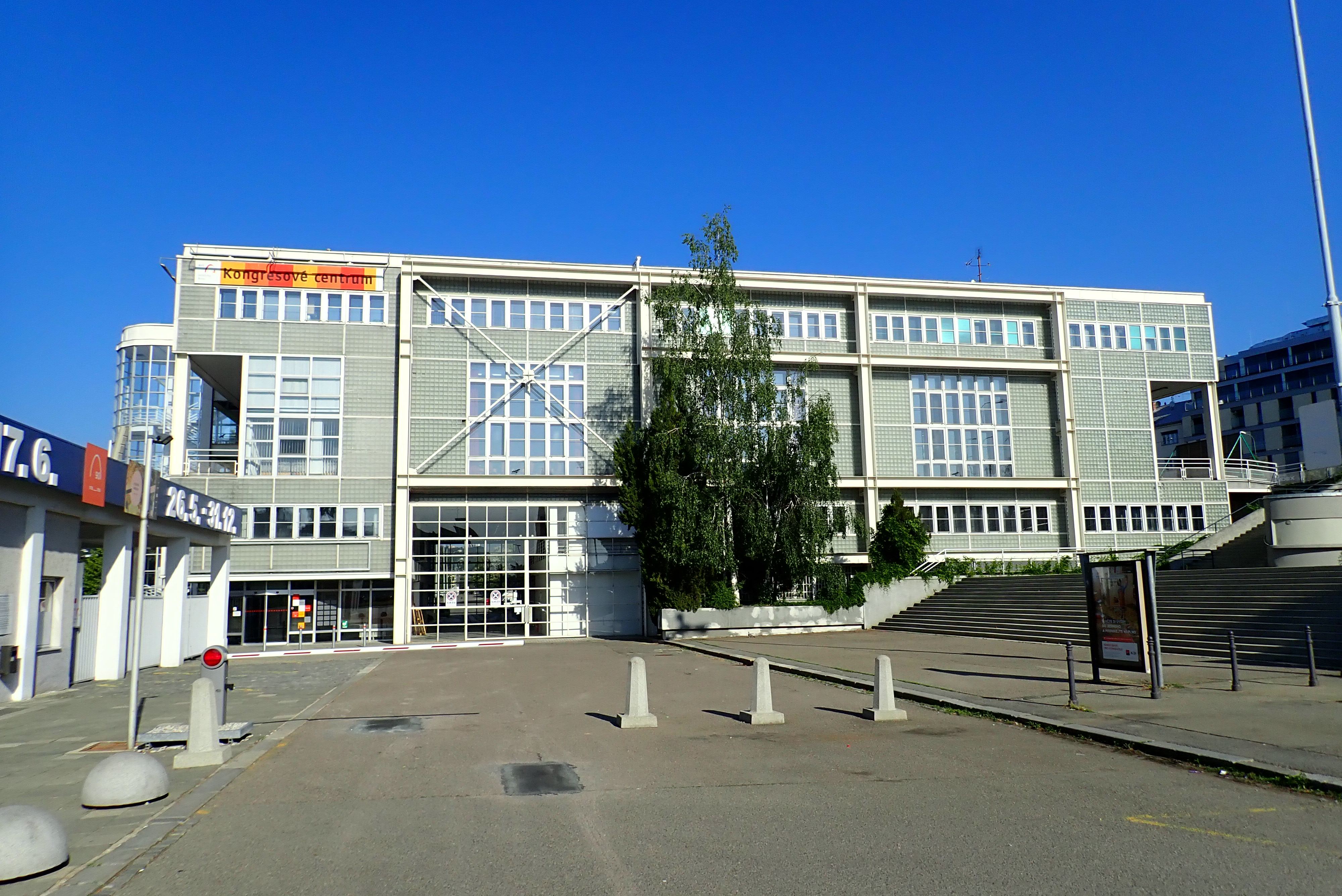 Kongresové centrum na výstavišti od východu